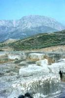 Le temple du mont Taphiasos dans la ancien ville de Calydon